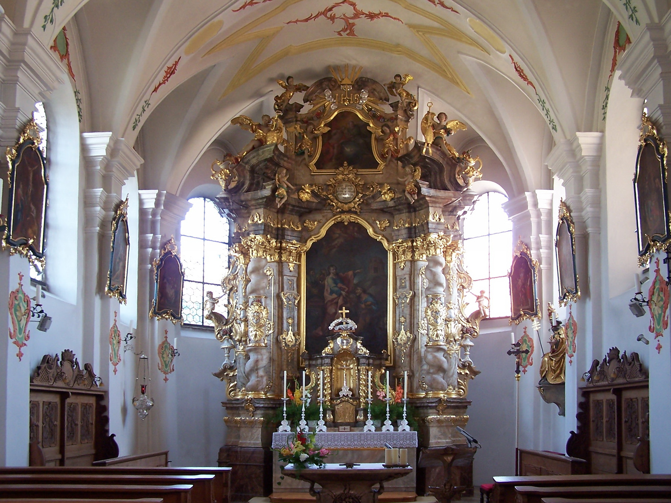 Sandsbach, Am Kirchberg 3; Am Kirchberg 2. Katholische Pfarrkirche St. Petrus. Saalkirche mit Steildach und eingezogenem, fünfseitig geschlossenem Chor. Der eingezogene Chor umfasst zwei Joche und den Schluss in fünf Achteckseiten. Vom ehemaligen spätgotischen Netzgewölbe sind die Rippen und Konsolen abgeschlagen. Das Chorgewölbe ist von stuckierten Rahmenfeldern und Rokokomuschelwerk aus der Zeit um 1760 belebt.